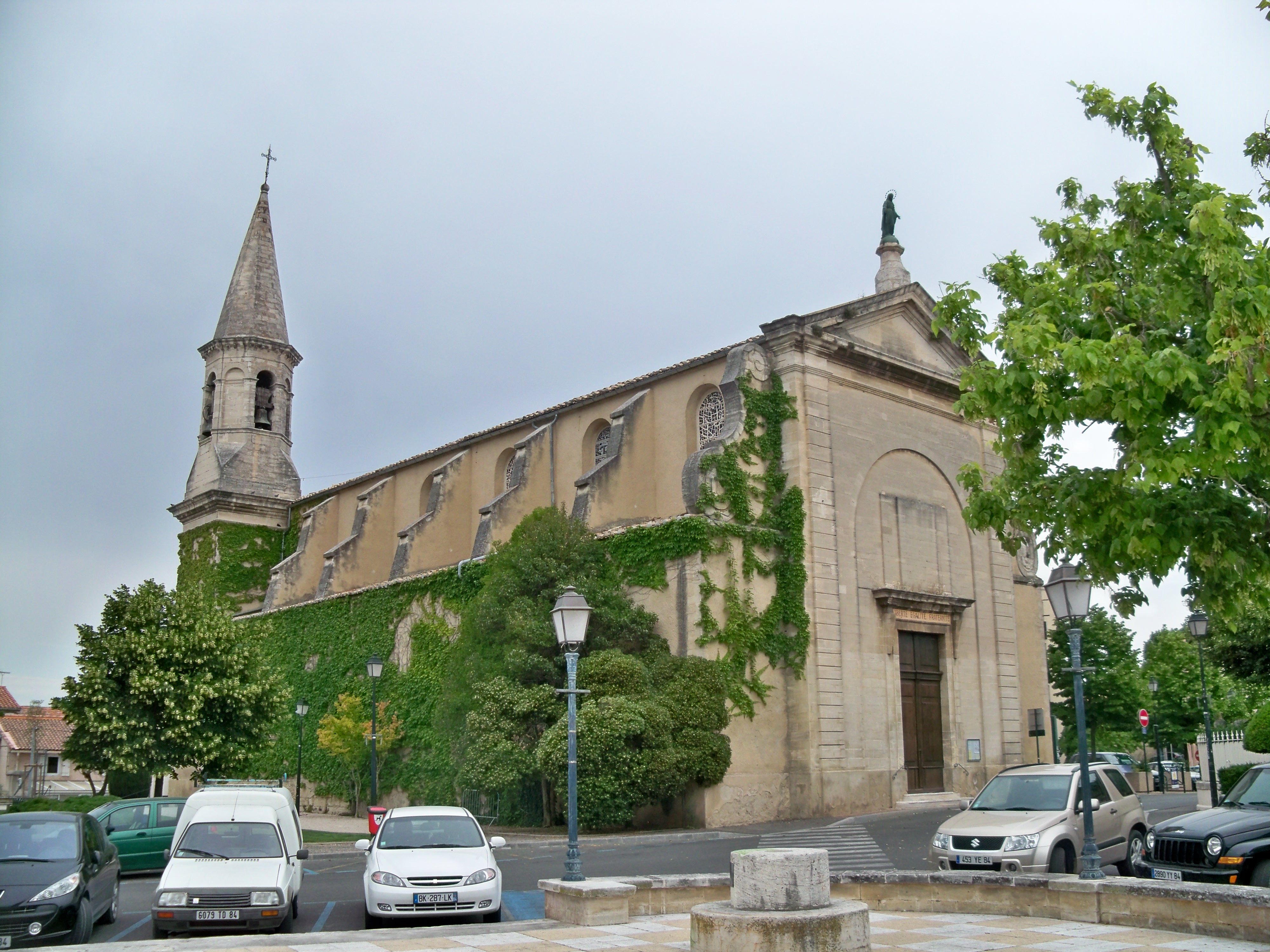 église de Morières les Avignon, Vaucluse, France